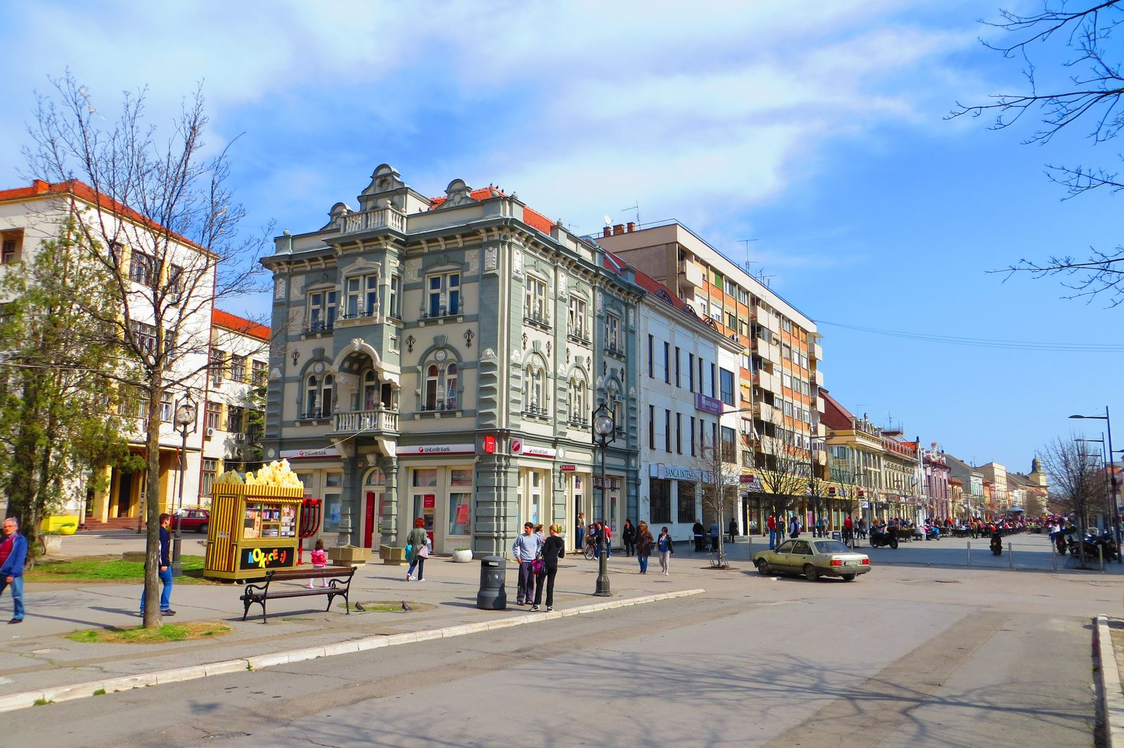 Centar, Zrenjanin, Serbia